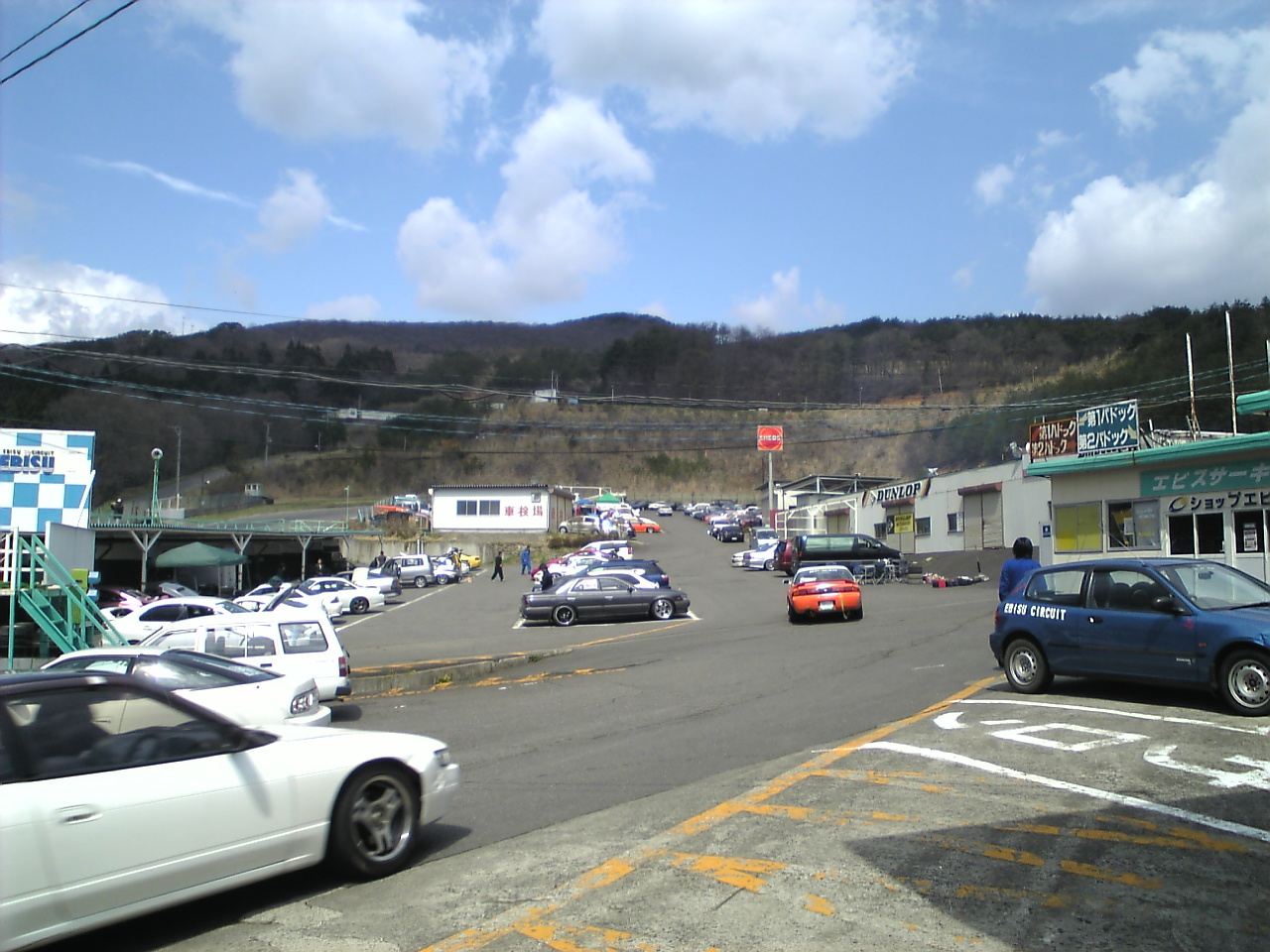 エビスサーキット東コース